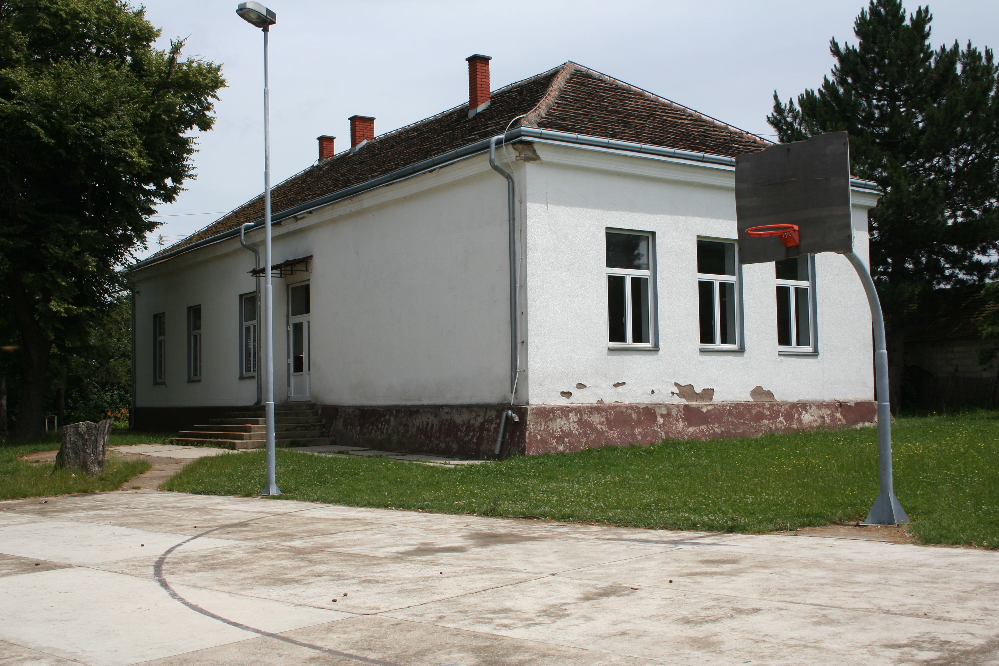 Dragojevac, opština Vladimirci - seoska škola